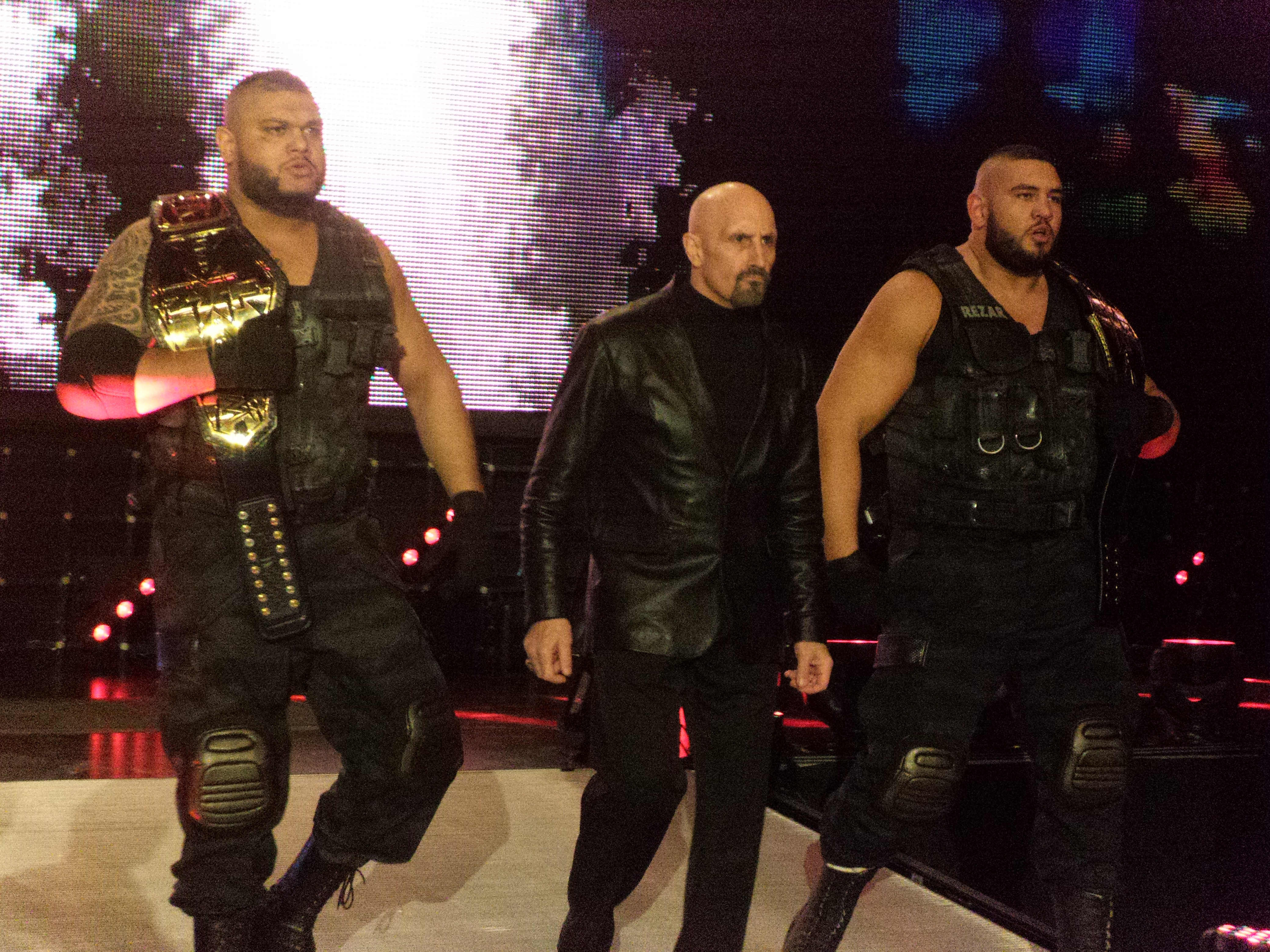 P_20170201_191226_002